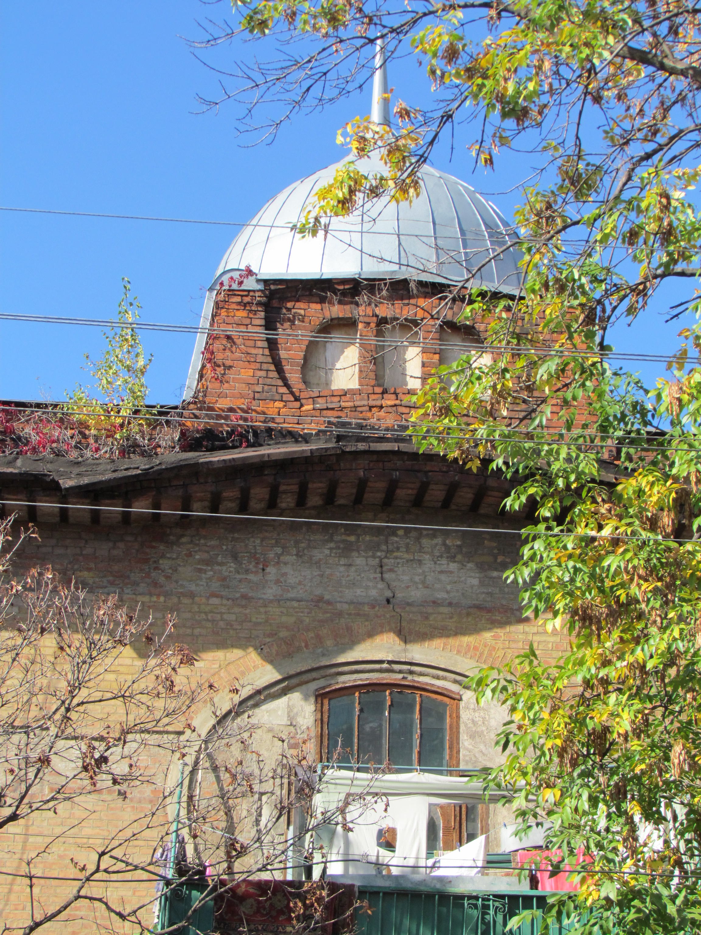 Україна, Харків, вул. Червоножовтнева, 26